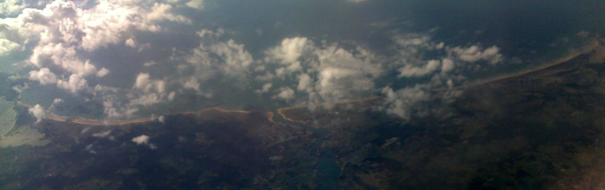 Vol BES BOD